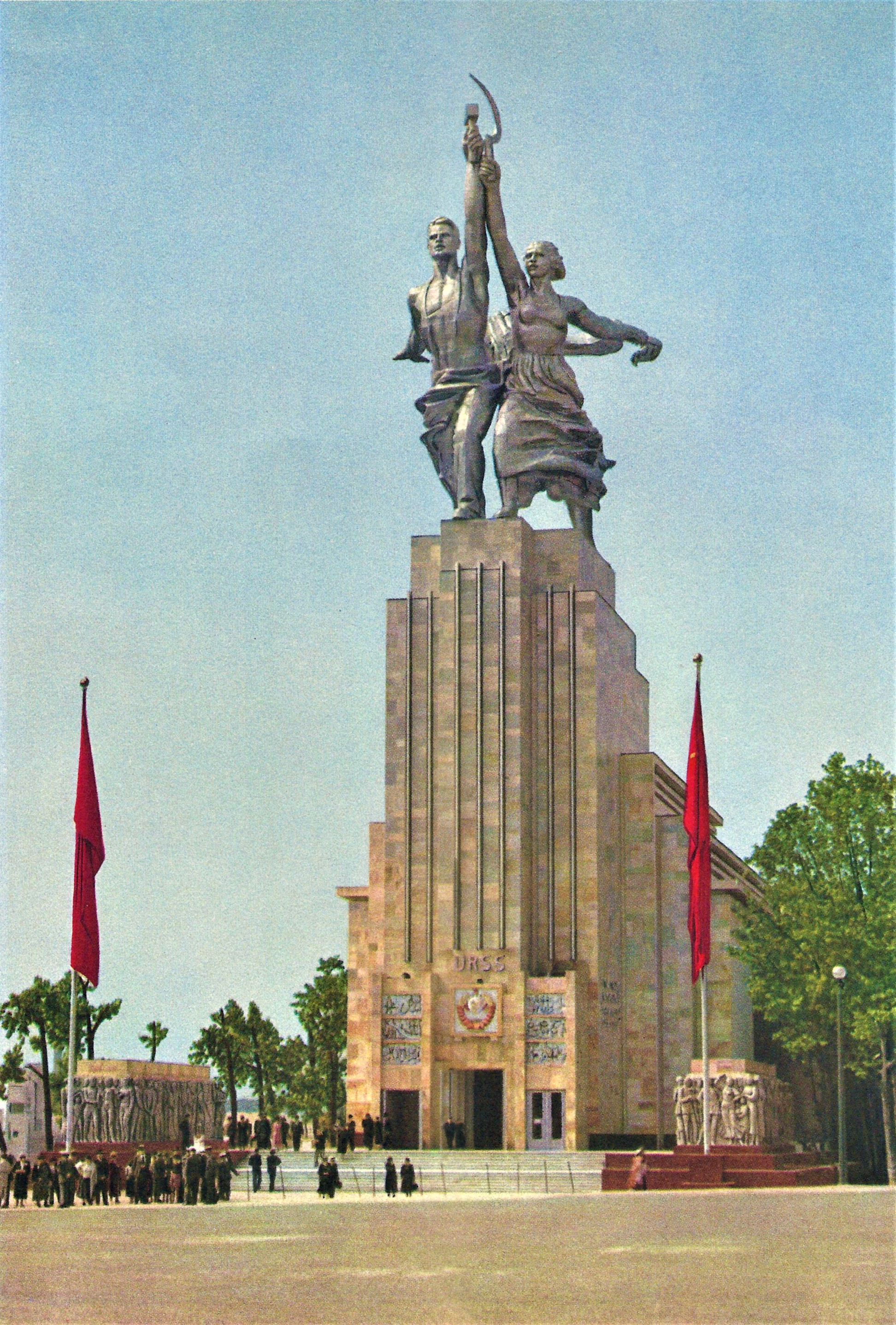 Exposition Internationale des Arts et Techniques dans la Vie Moderne (Paris-1937) , le pavillon de l'URSS.